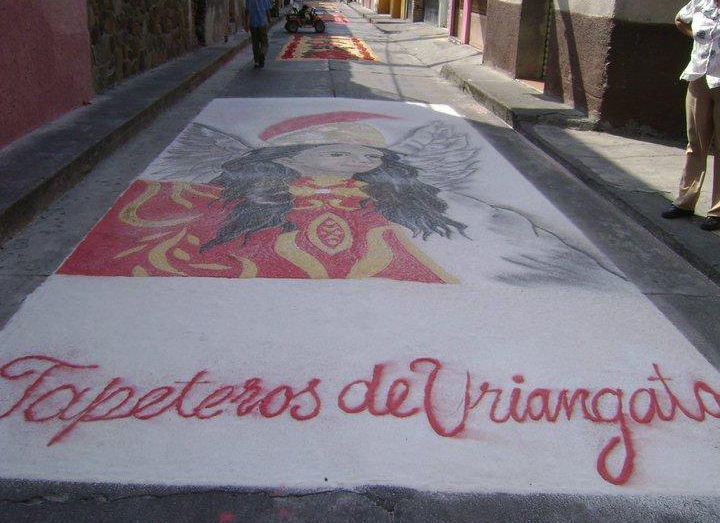 Muestras artísticas de los tapetes realizados en Uriangato, Gto.